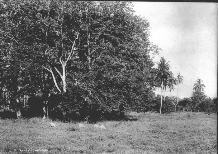 Foto. Grazende geiten of schapen in de omgeving van de spoorhalte Sawah Besar, Batavia